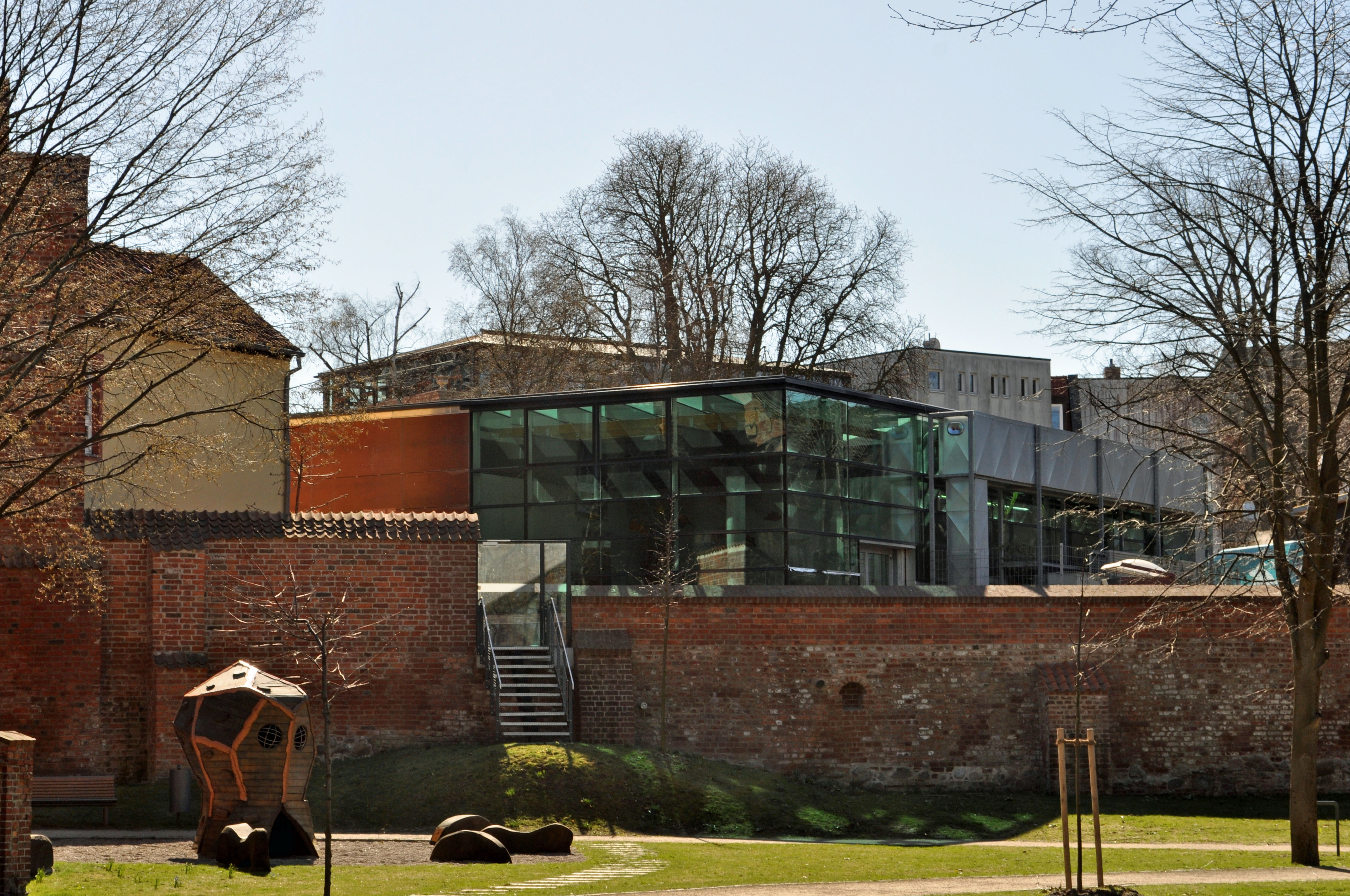 Gebäude bzw. Gebäudedetail in Stralsund. Straße und Hausnummer siehe Dateiname.